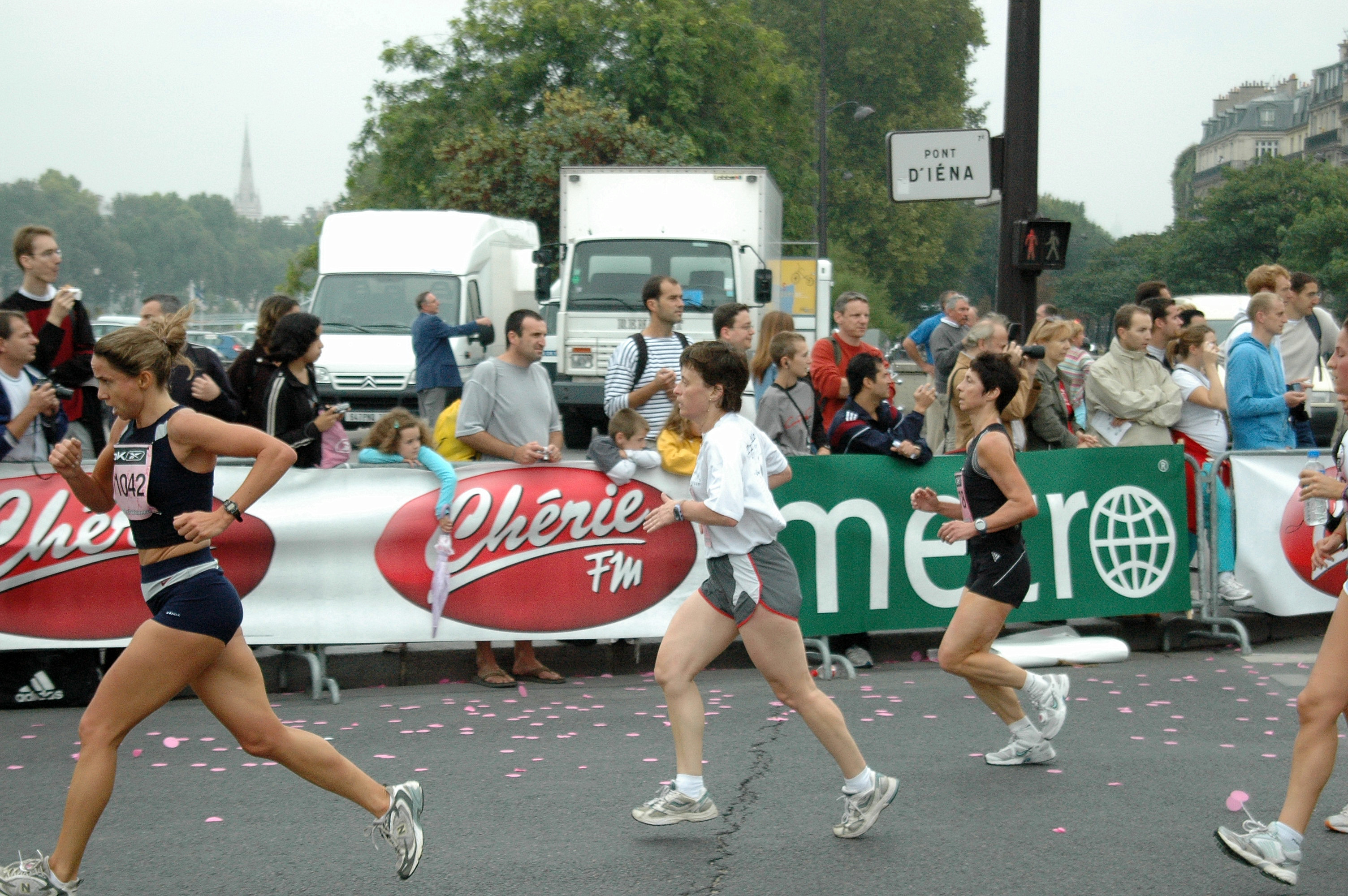 course à pied La Parisienne